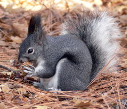 Abert's Squirrel (Sciurus aberti)